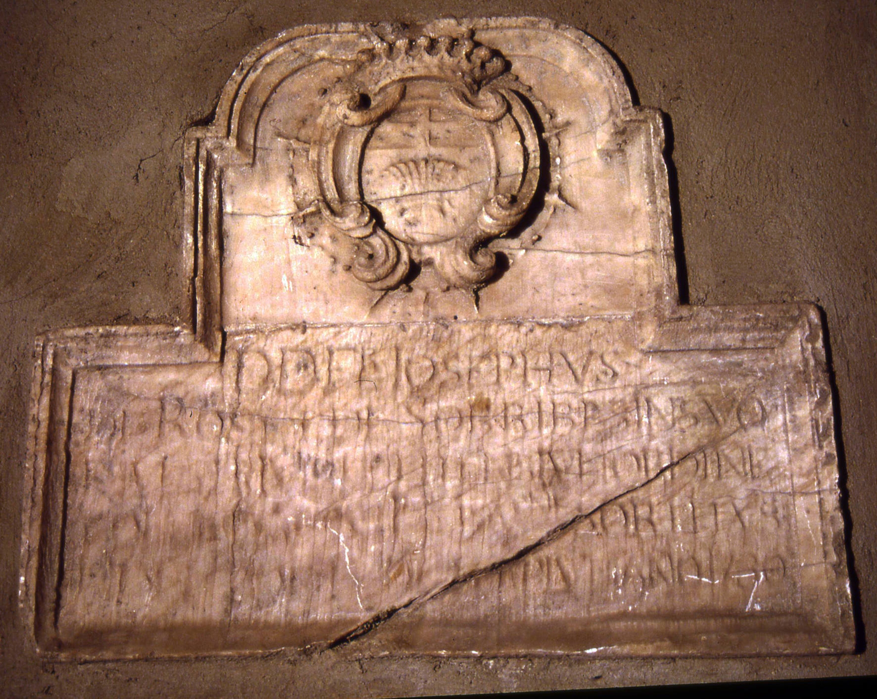 Barcelona, Torre de Sant Joan del Clot de la Mel. Làpida conmemorativa del comanador Josep de Ros, es troba dins la capella que ell restaurà. 2005.